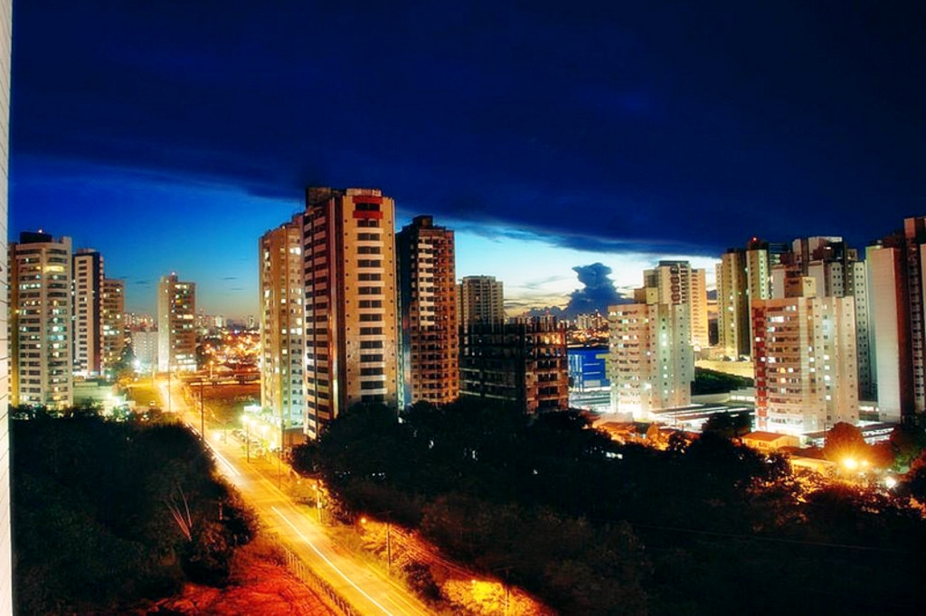 Bairro do Aleixo em Manaus, Brasil